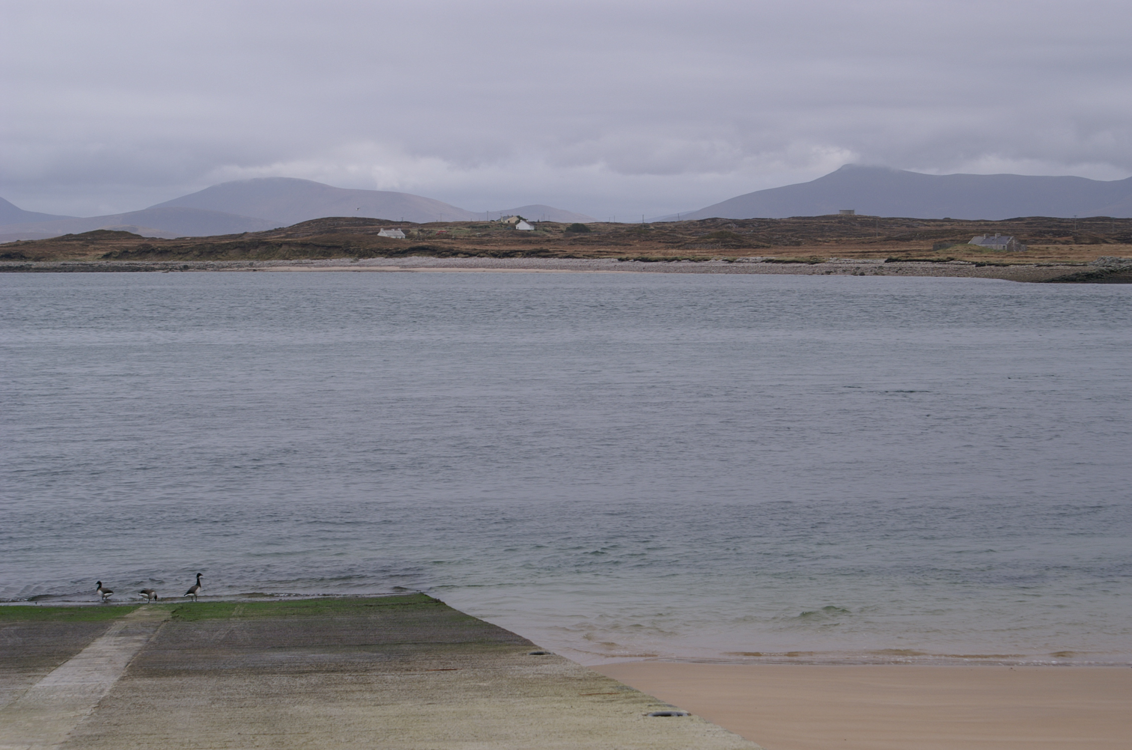 Gaelg: no original description